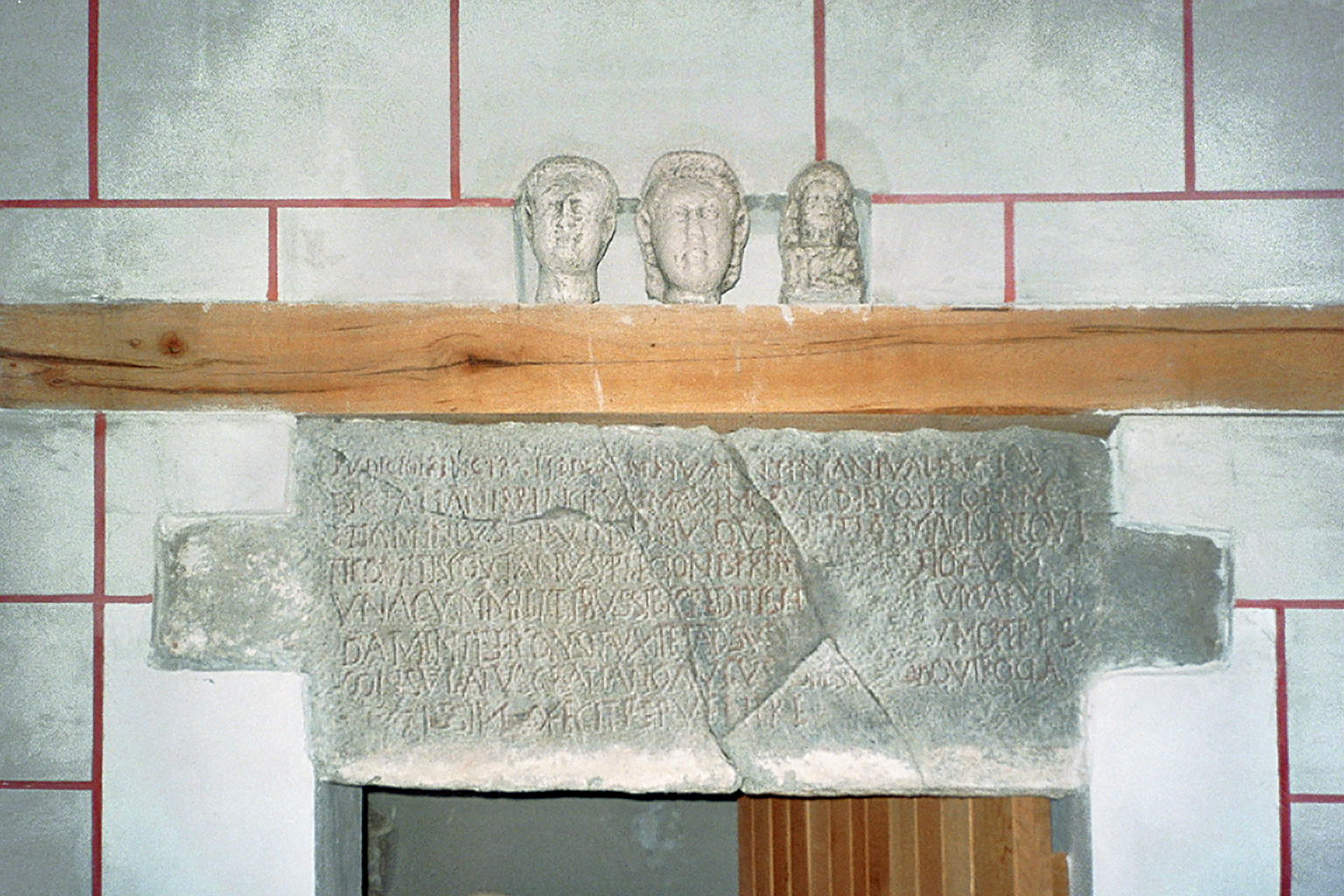 Visegrád-Lepence (Burgus Solva 35, Ungarn): Bauinschrift des Burgus von 371 n. Chr. Literatur: AE 2000, 01223. Text: Iudicio principali ddd(ominorum) nnn(ostrorum) Val[e]ntiniani Valentis et Gratiani principum maximorum dispositione{m} etiam inlustris viri utriusque militiae magistri equi- ti comitis Foscianus p(rae)p(ositus) legionis prim[ae Mar]tiorum una cum militibus sibi creditis h[unc bur]gum a fun- damentis et construxit et ad sum[(m)am man]um operis consulatu{s} Gratiano Augus[t]o bis e[t Pr]obo viro cla- rissimo fecit pervenire